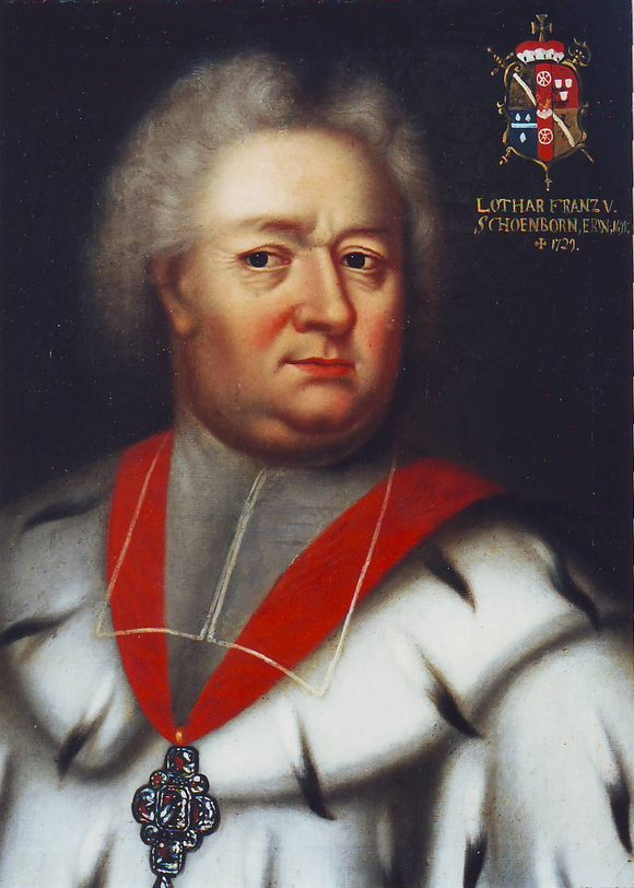 Lothar Franz von Schoenborn (1655-1729), Kurfürst-Erzbischof von Mainz